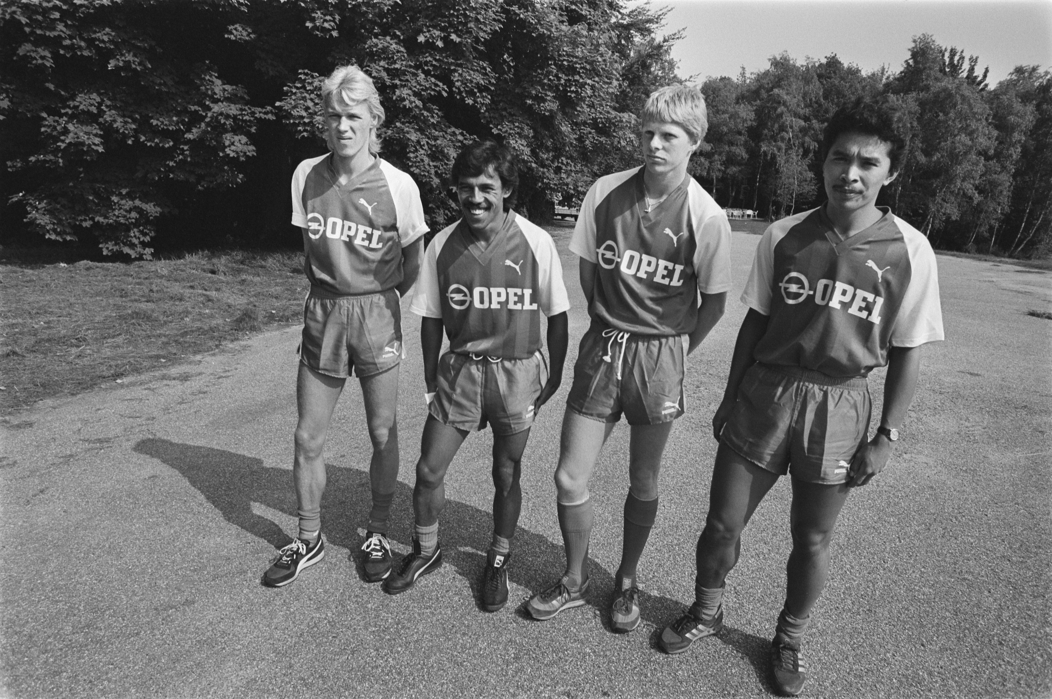 Eerste training Feyenoord voor het nieuwe seizoen in het Kralingse Bos ; nieuwe aanwinsten Pétur Pétursson, Simon Tahamata, Johan Steur en Ronald Carli. Juli 1984. ANEFO NL-HaNA 2.24.01.05 0 933-0381